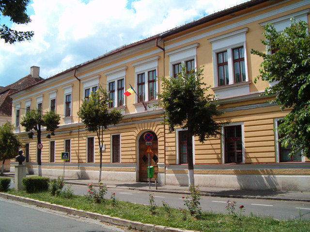 Cluj-Napoca, Colegiul Național Emil Racoviță (str. M.Kogălniceanu nr.9)